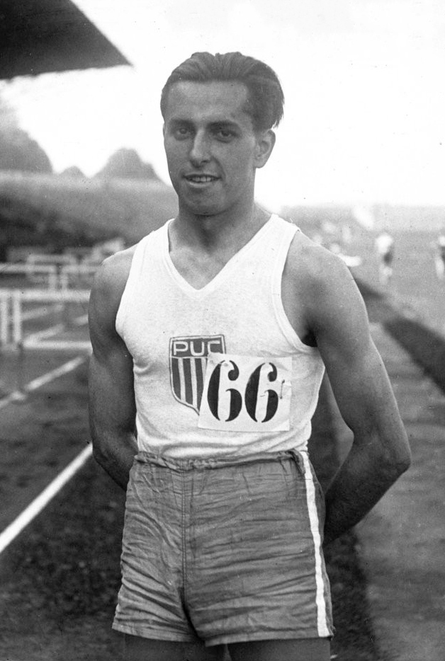 Traversée de l'Atlantique : Marchand, gagnant du 110 m haies (portrait à 2 m) : [photographie de presse] / Agence Meurisse